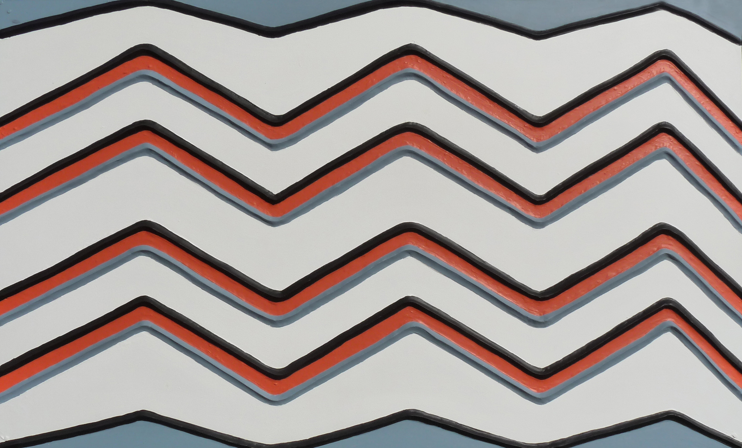 Motifs géométriques traditionnels de l'art Imigongo, né à la fin du 18e s. dans la province de Kibungo (Rwanda). Panneaux installés à Saint-Dié-des-Vosges dans le cadre du 22e Festival international de géographie où le Rwanda était le pays invité.